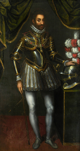 Ritratto di Emanuele Filiberto I di Savoia (1528-1580)